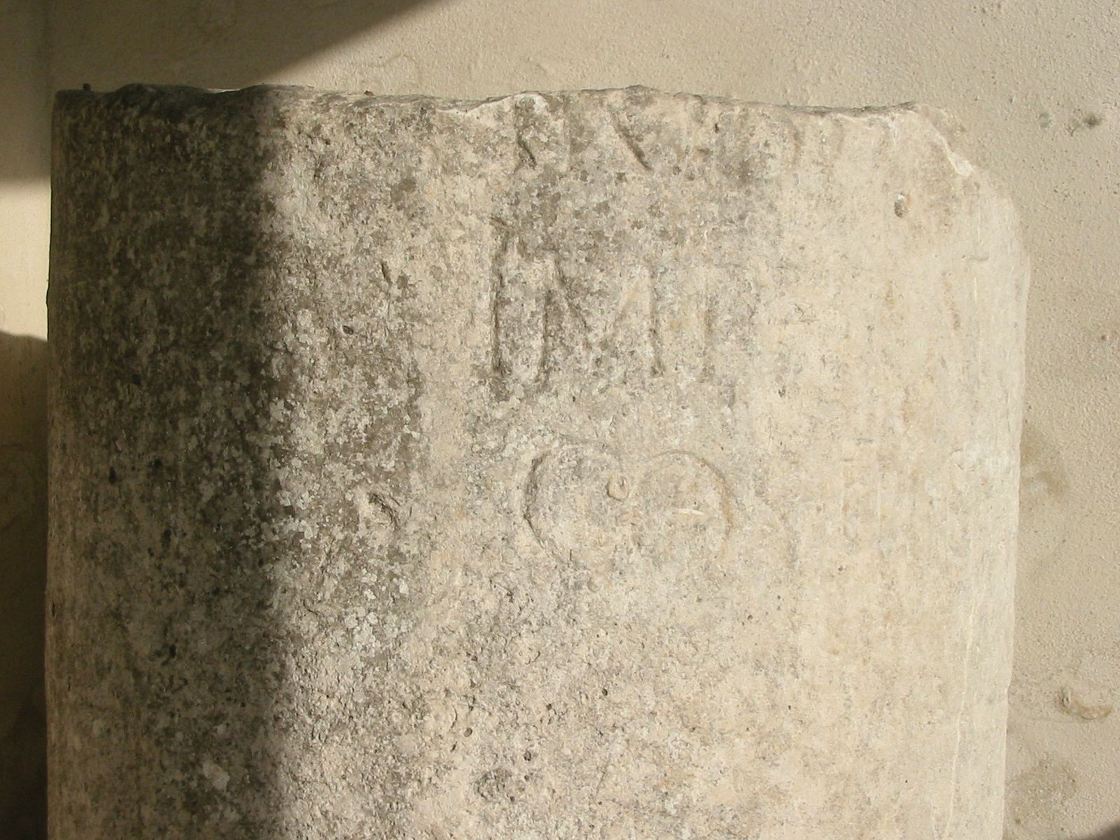 Milliaire de Chadenac (ancienne borne milliaire de la voie Saintes-Pons-Périgueux creusée en sarcophage), cimetière de Chadenac, Charente-Maritime, France